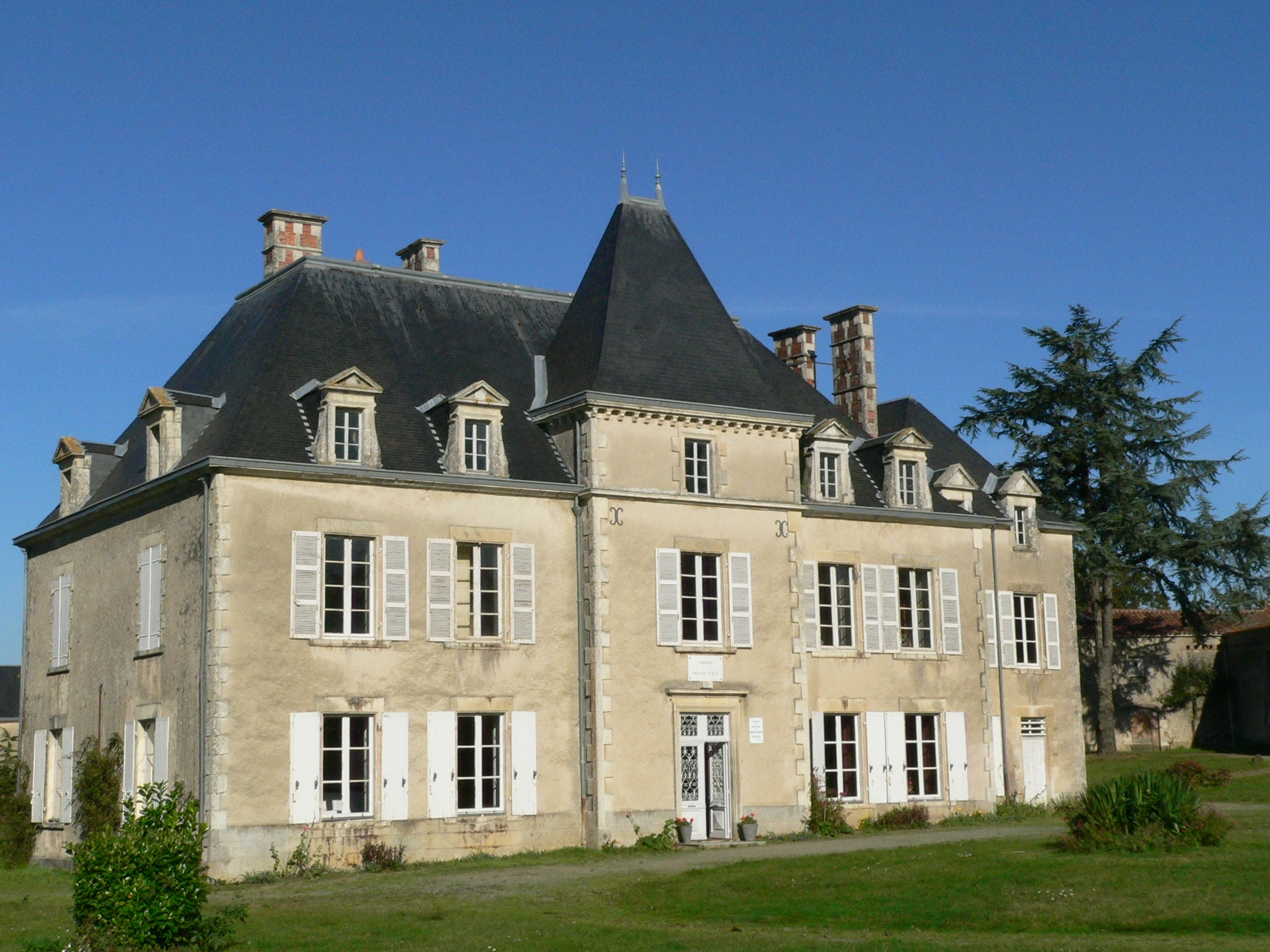 Le musée de la France Protestante de l'Ouest est installé dans le château du Bois-Tiffrais.Une mine de documents sur plus de 500 ans de l'Histoire mouvement des Guerres de religion.